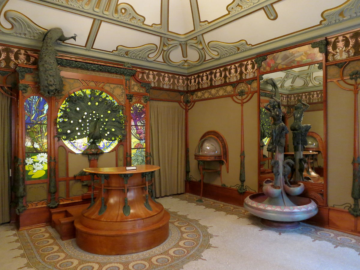 Boutique du bijoutier Georges Fouquet située 6 rue Royale à Paris et conçue en 1901 par Mucha, maitrise d'oeuvre de la réalisation par la maison Jansen qui fit appel à Léon Fargues pour les vitraux, démonté en 1923, musée Carnavalet (Paris)